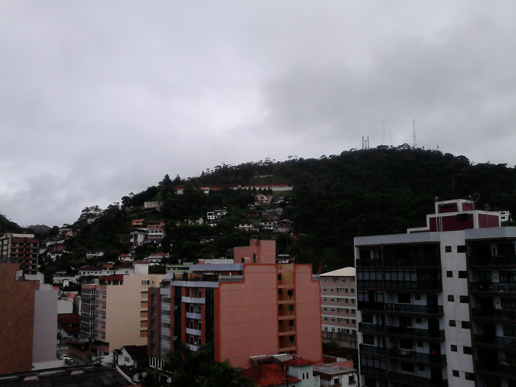 Torres de comunicação no topo da montanha (ao fundo dos prédios), localizada no bairro Vila Muqui.